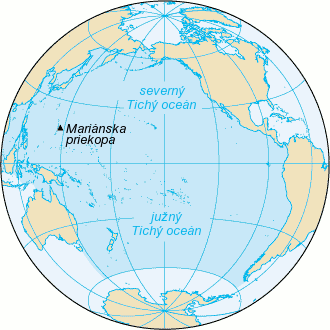 Tichý oceán, slovenské popisky Source: sk modifikacia z en verzie Pacificocean.PNG This work has been released into the public domain by its author, Julo. This applies worldwide. In some countries this may not be legally possible; if so: Julo grants anyone the right to use this work for any purpose, without any conditions, unless such conditions are required by law. Kategória:Obrázky máp